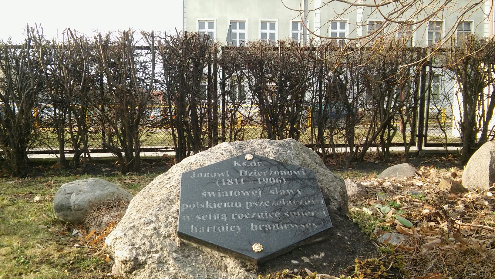 Jan Dzierżon Braniewo